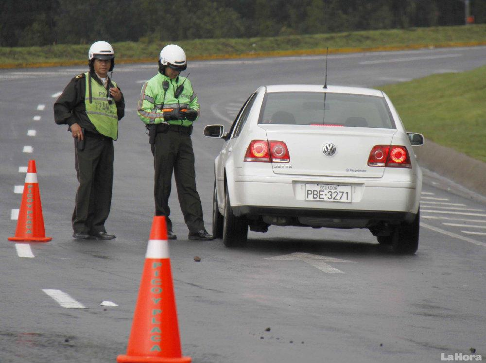 Policía de transito en Quito, Ecuador.